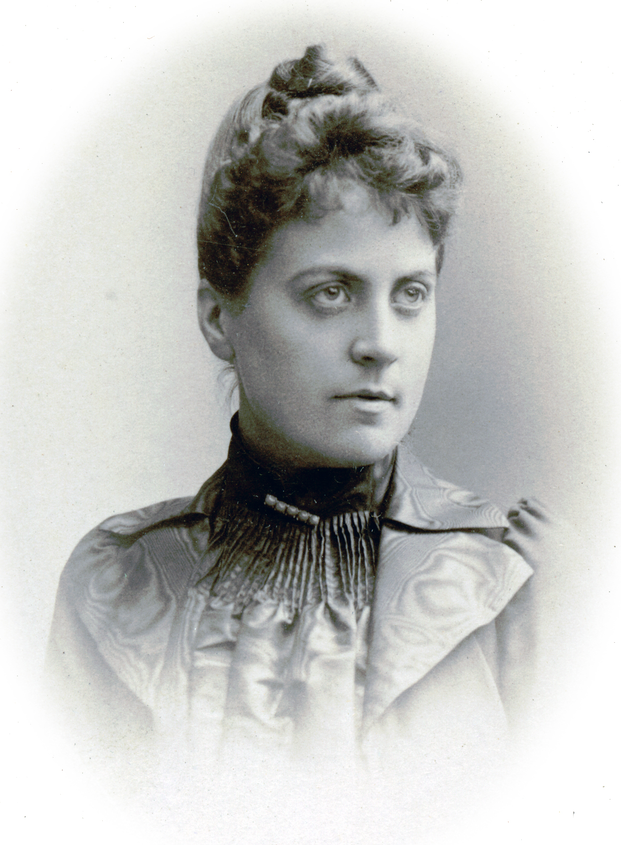 Mathilda Jungstedt, sångare vid Kungliga Operan 1889